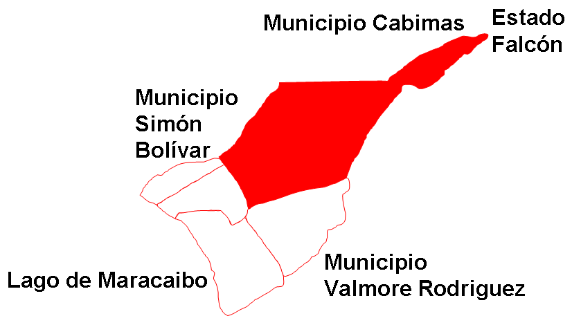 Ubicación de la parroquia Eleazar López Contreras en el municipio Lagunillas, estado Zulia, Venezuela